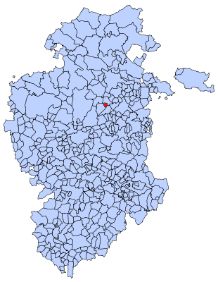 Carcedo de Bureba en Burgos